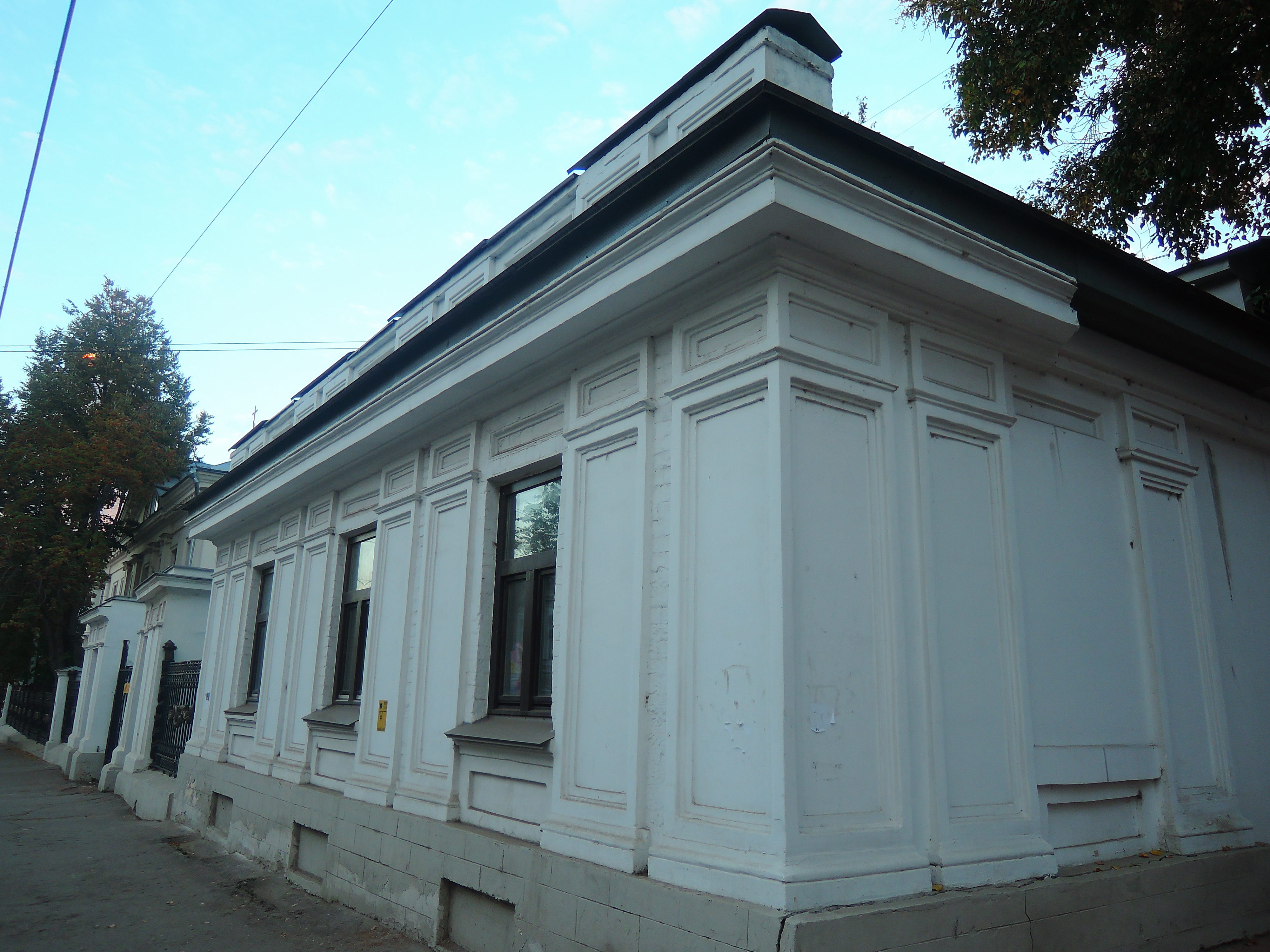 Флигель: улица Ильинская, 56 (лит.Б), Нижний Новгород, Нижегородская область